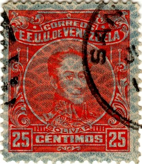 Busto de Simon Bolivar estampilla venezolana de 25 centimos emitida en 1932